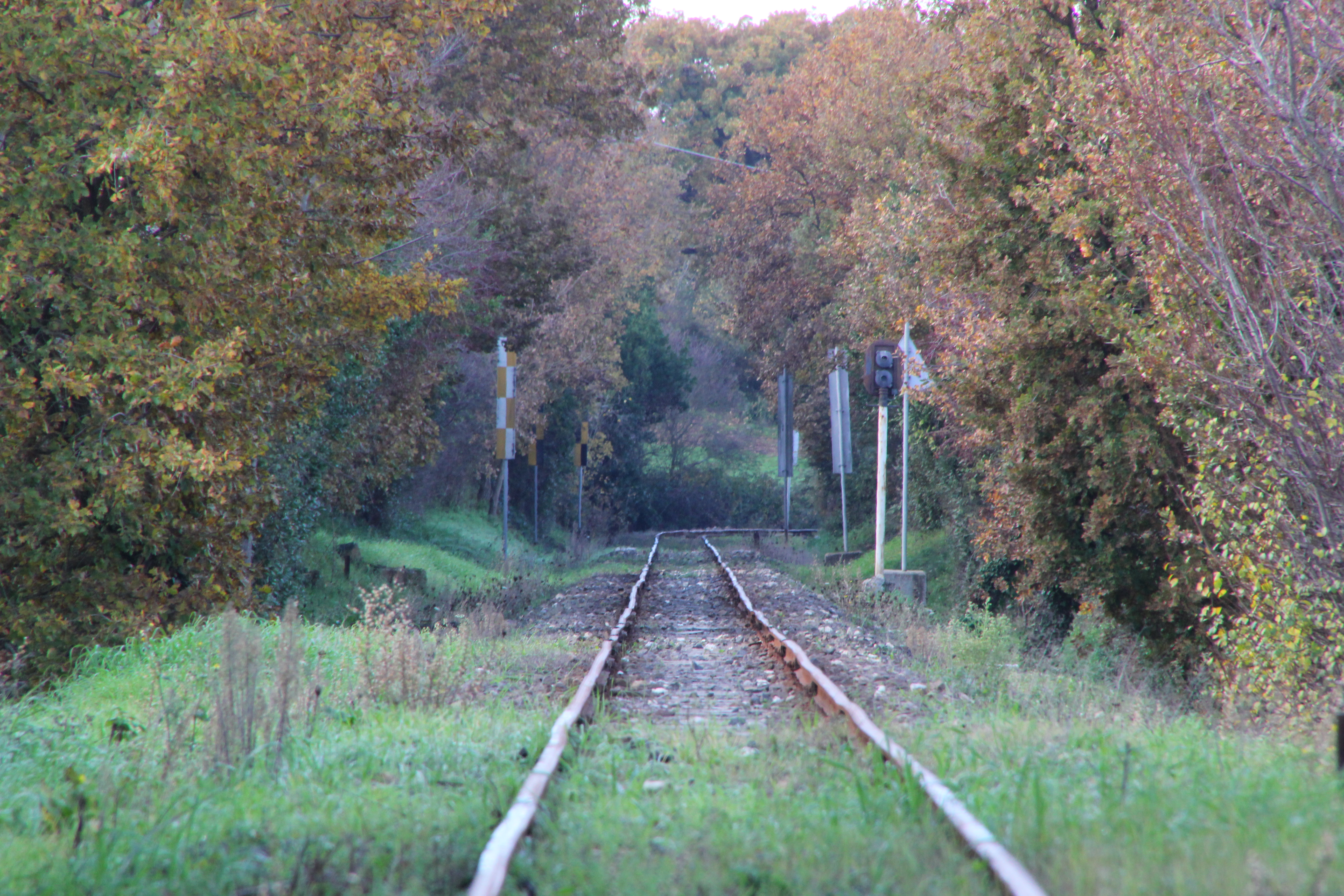 Osilo - Casello n.6 ferrovia Sassari-Palau